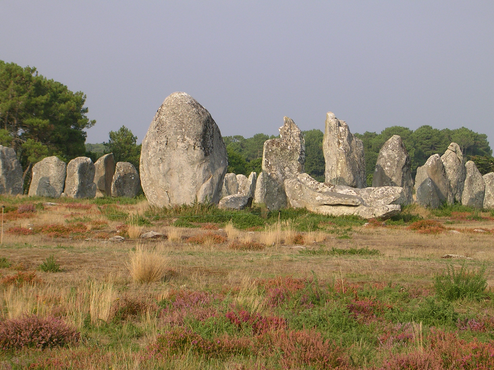 Alignement de Kermario .